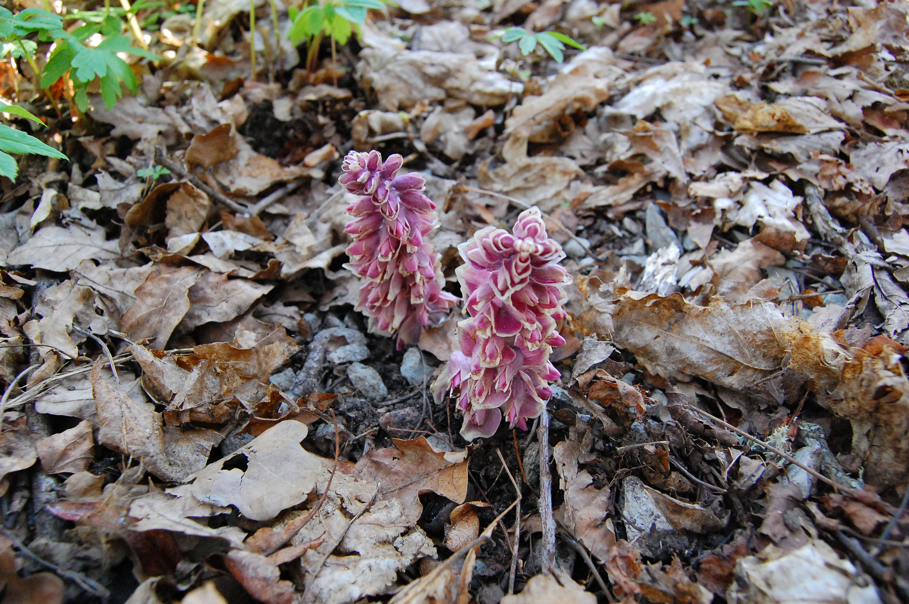 Käopäkk